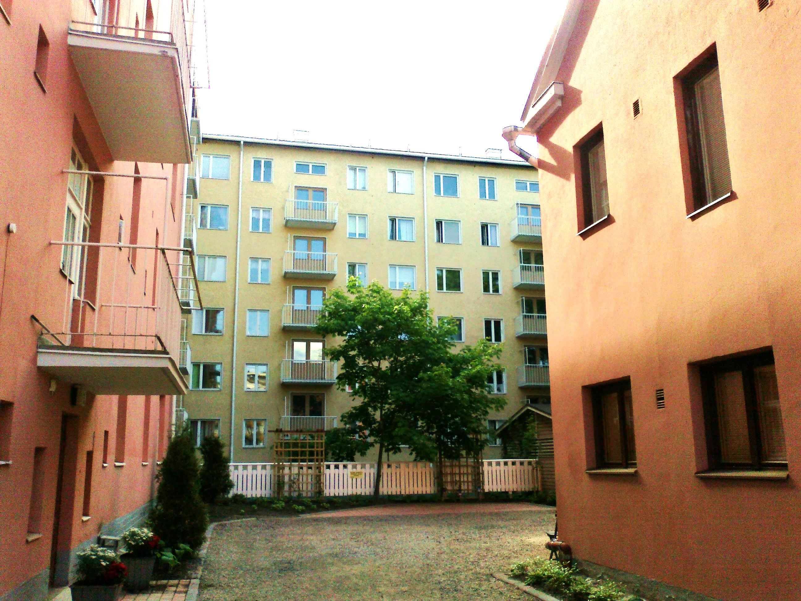 Kerrostaloja Kuopiossa